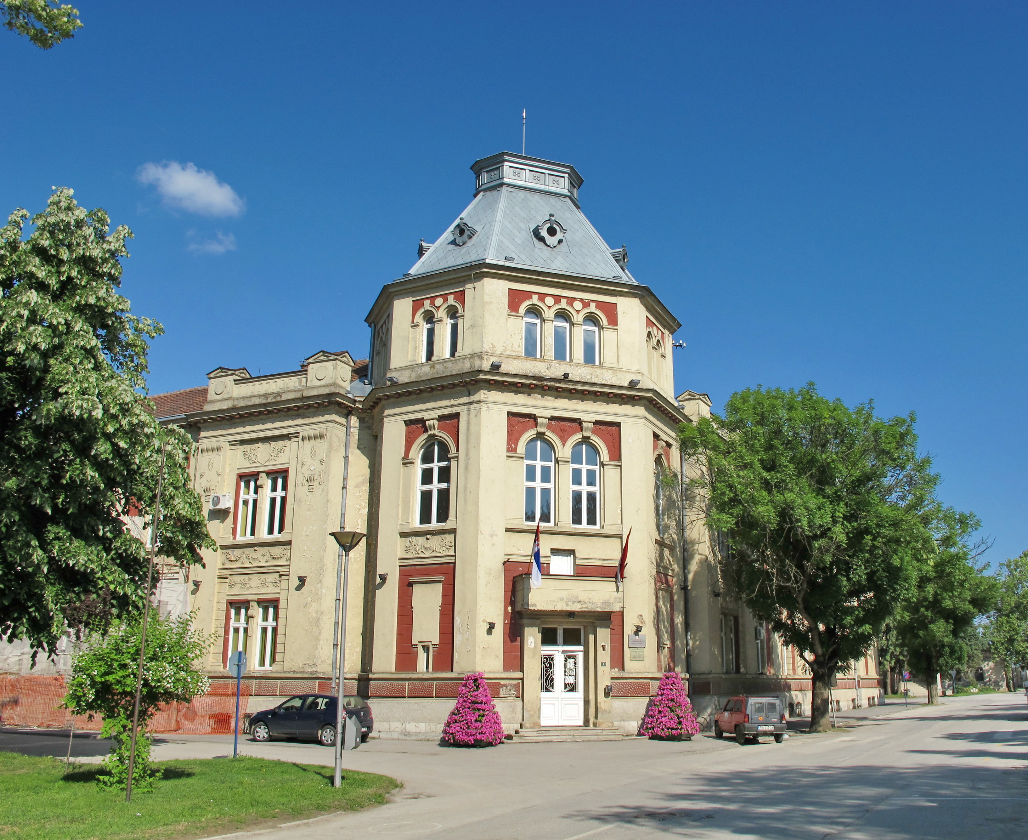 Zgrada opštine Veliko Gradište nalazi se u građanskoj kući, izgrađenoj u prvoj polovini XX veka.